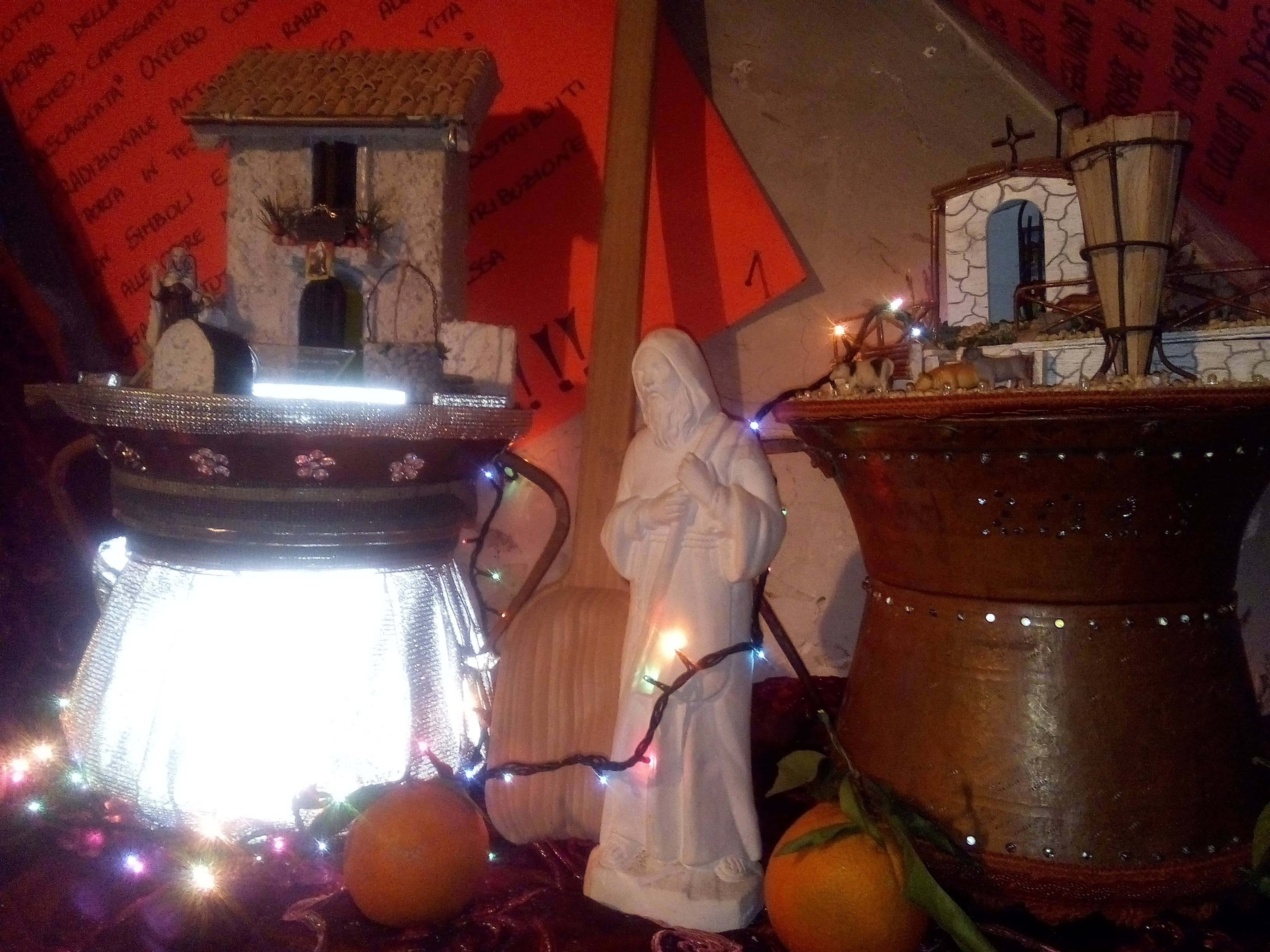 Le conche rescagnate (addobbate) di Collelongo